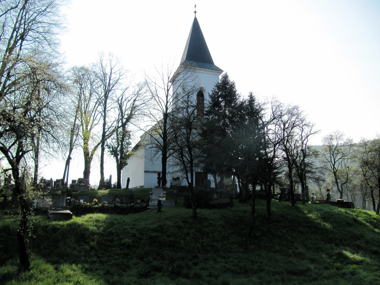 Telkibányai református templom